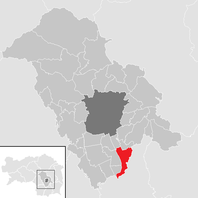 Lage von Fernitz-Mellach im Bezirk Graz-Umgebung